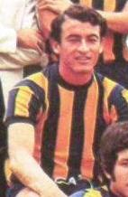 Palito Correa